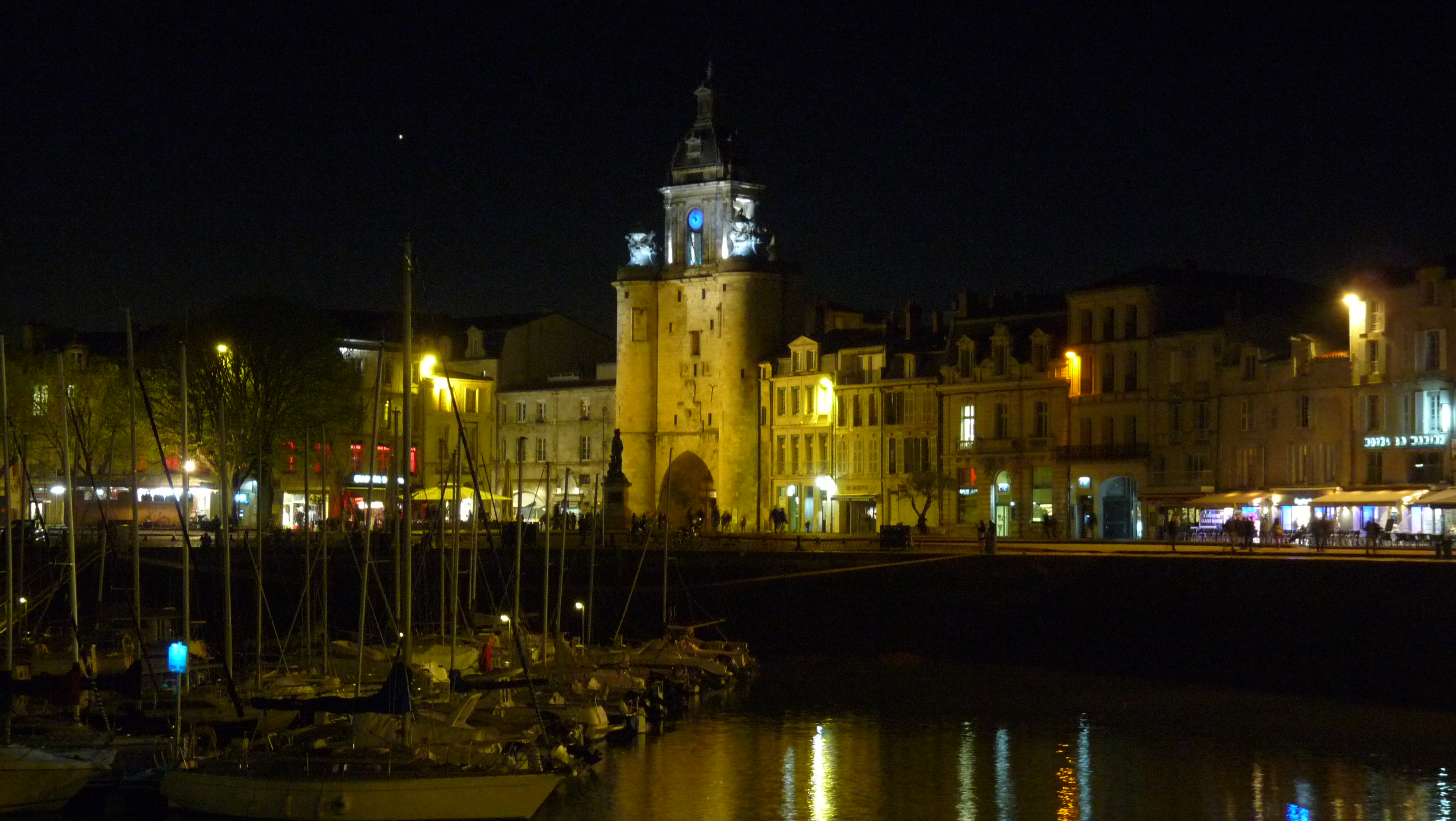 Haveno de La Rochelle